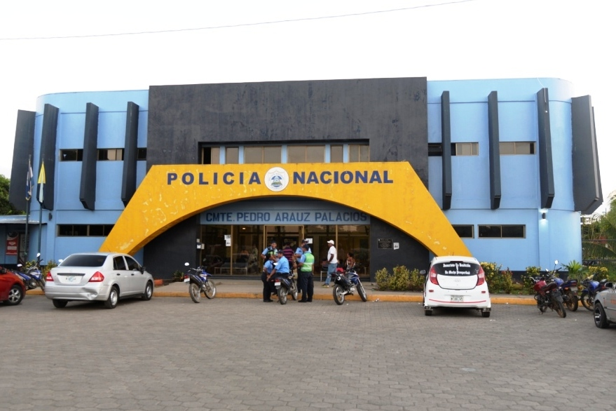 La estación de la policía en Tipitapa.